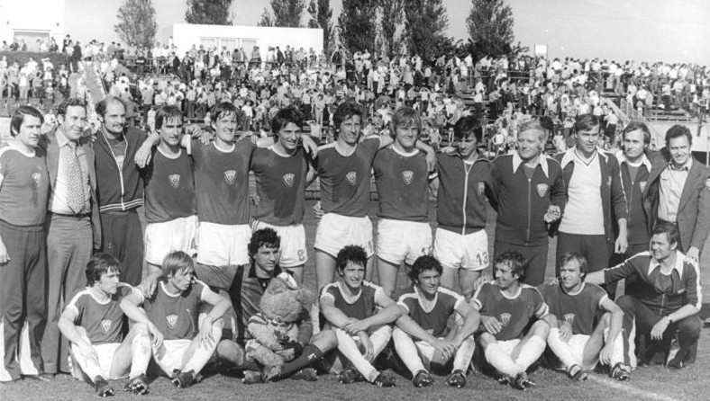 ADN-ZB-Deutsche Demokratische Republik 6.6.79 re Berliner FC Dynamo erstmals DDR-Fußballmeister (2 Motive). Strahlende Gesichter beim neuen DDR-Fußballmeister BFC Dynamo nach dem entscheidenden Spiel gegen Titelverteidiger Dynamo Dresden am 26.9.79 in Berlin, das die Hauptstädter mit 3:1 (1:1) klar gewannen. Das sind das Leitungskollektiv und das Spieleraufgebot des Berliner FC Dynamo: (stehend v.l.n.r.) Mannschaftsleiter Joachim Hall, Clubvorsitzender Manfred Kirste, Torwart Reinhard Schwertner (22 Jahre), Roland Jüngling (22), Norbert Trieloff (22), Artur Ullrich (21), Hartmut Pelka (22), Ralf Sträßer (20), Albert Ullrich (21), Mannschaftsarzt Dr. Kurt Poltrock, Trainer Jürgen Bogs, Masseur Tost, Cheftrainer Dr. Dieter Fuchs. Sitzend v.l.n.r.: Michael Noack (24), Hans-Jürgen Riediger (23-27 Länderspieleinsätze), Bodo Rudwaleit (21-4), Rainer Troppa (20), Reinhard Lauck (32-33), Frank Terletzki (28-3), Wolf-Rüdiger Netz (28-1) und Trainer Martin Skaba. Mit einem Durchschnittsalter von 23,1 Jahren ist der BFC Dynamo die jüngste Oberliga-Mannschaft der DDR. Reporter: Mittelstädt, Copyright: ADN-Zentralbild. Bitte beachten Sie hierzu das Foto U0526-34N